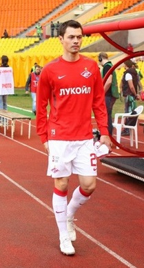 Динияр Билялетдинов в составе «Спартака» перед матчем с ЦСКА